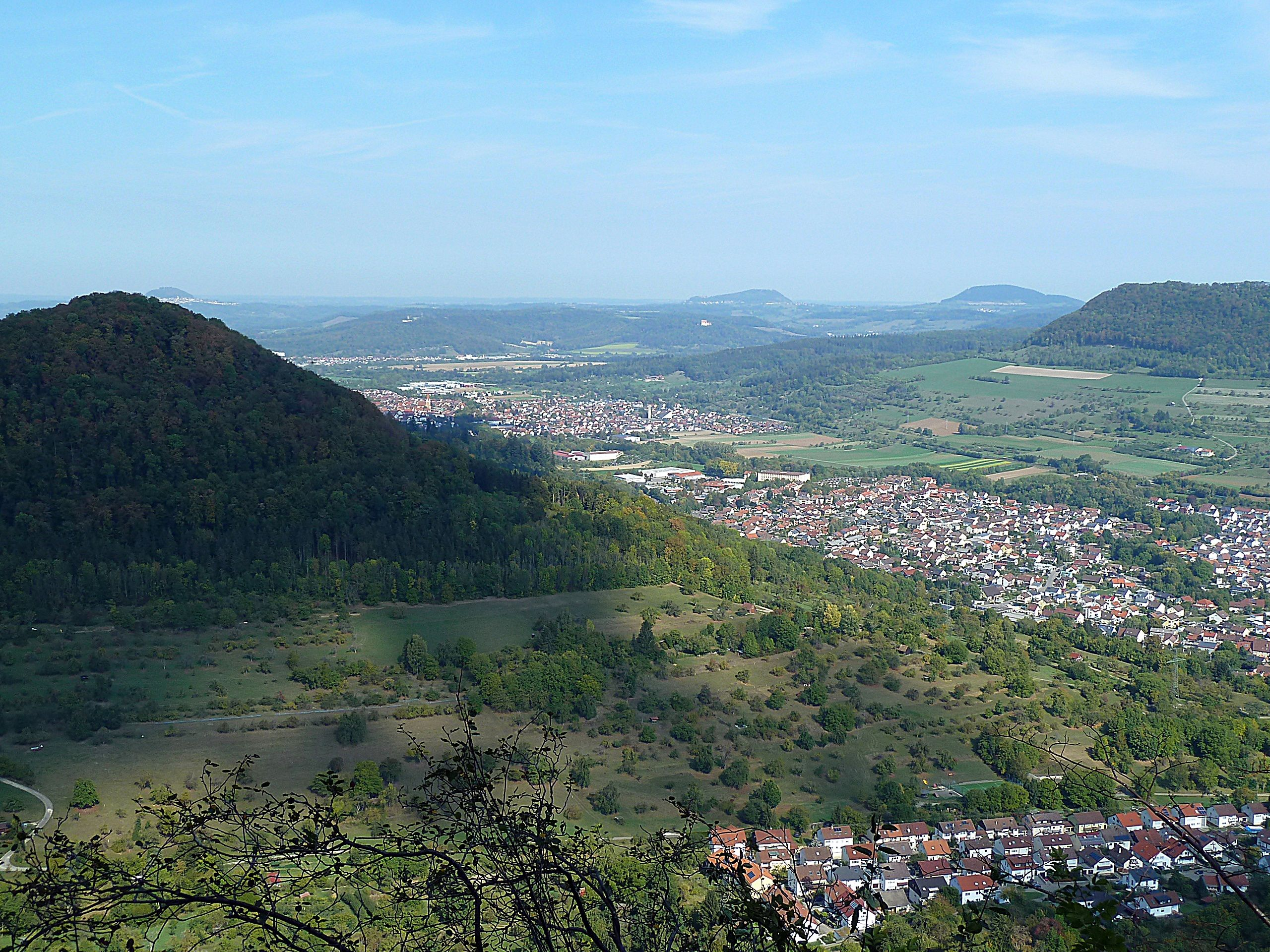 Blick vom Ramsfelsen auf Kuchen, Gingen und die Kaiserberge